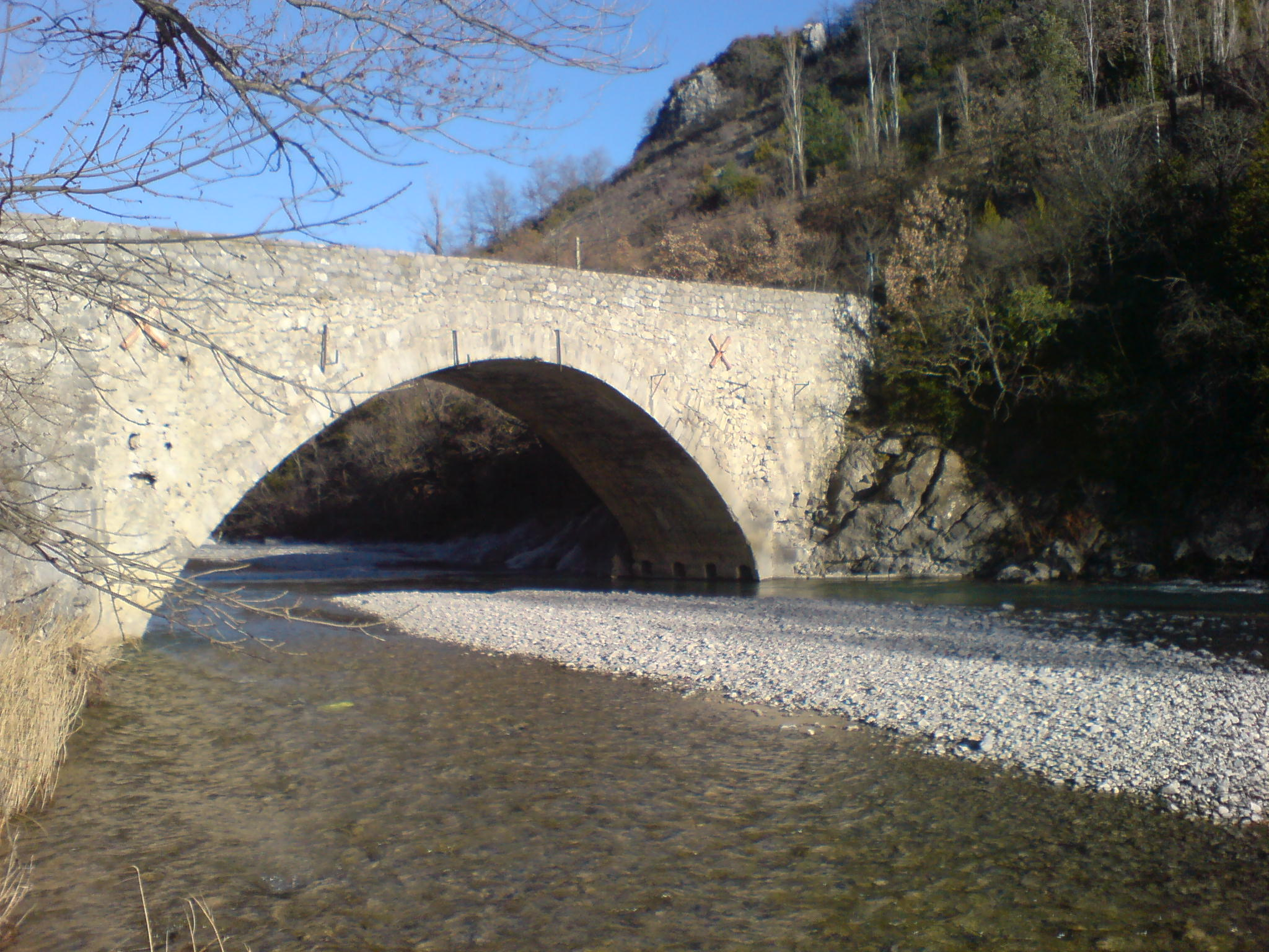 Pont construit selon les techniques du Moyen Âge, sur le Jabron, à Peipin, en 1666. Trous de boulin du cintre de construction visibles ; agrafes de fer.